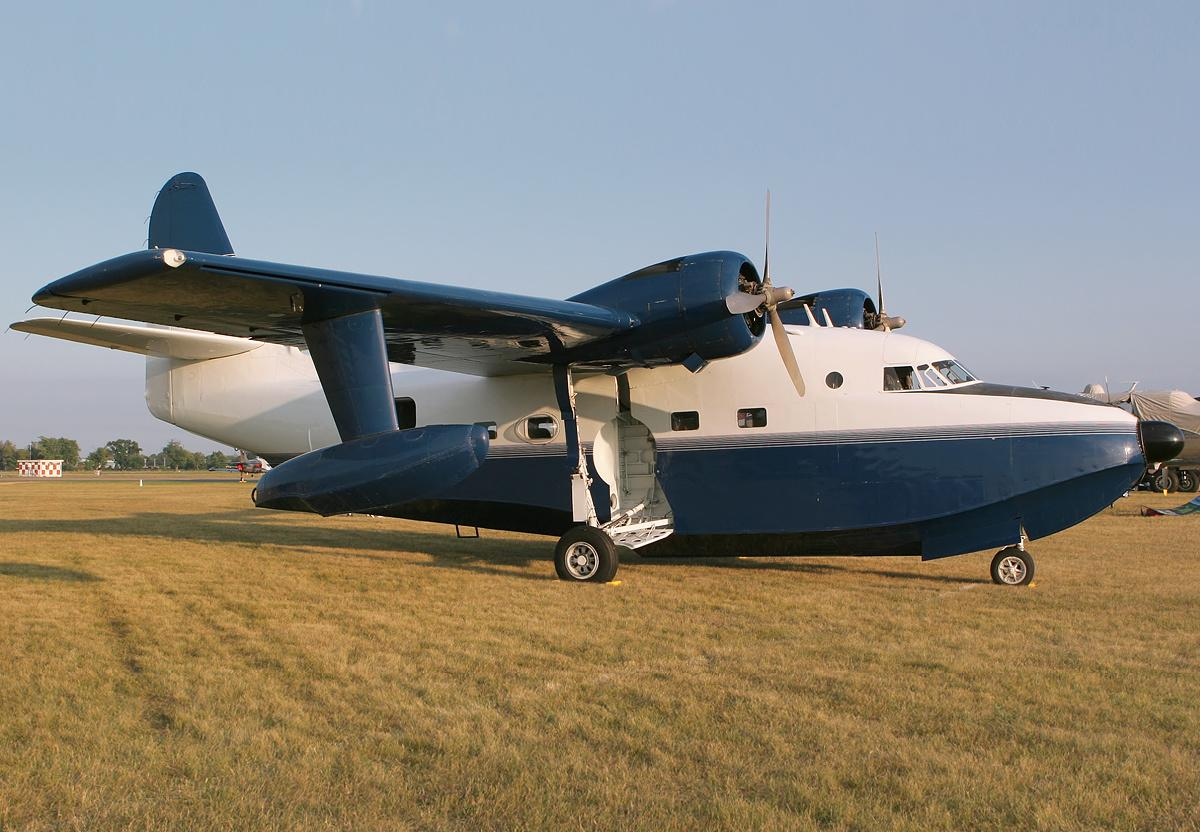 (AirVenture 2007)